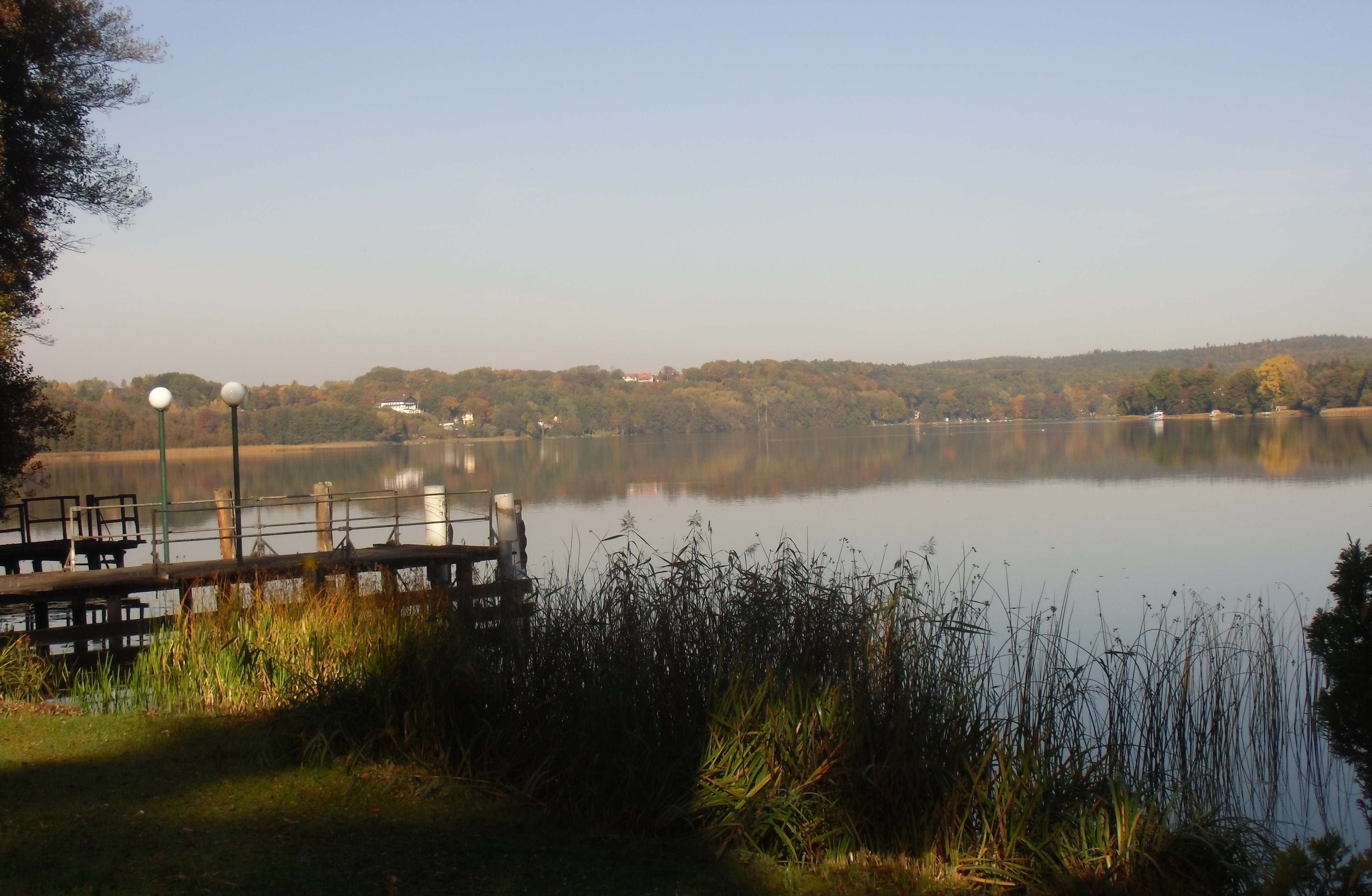 Blick von der Fischerkehle auf den Schermützelsee